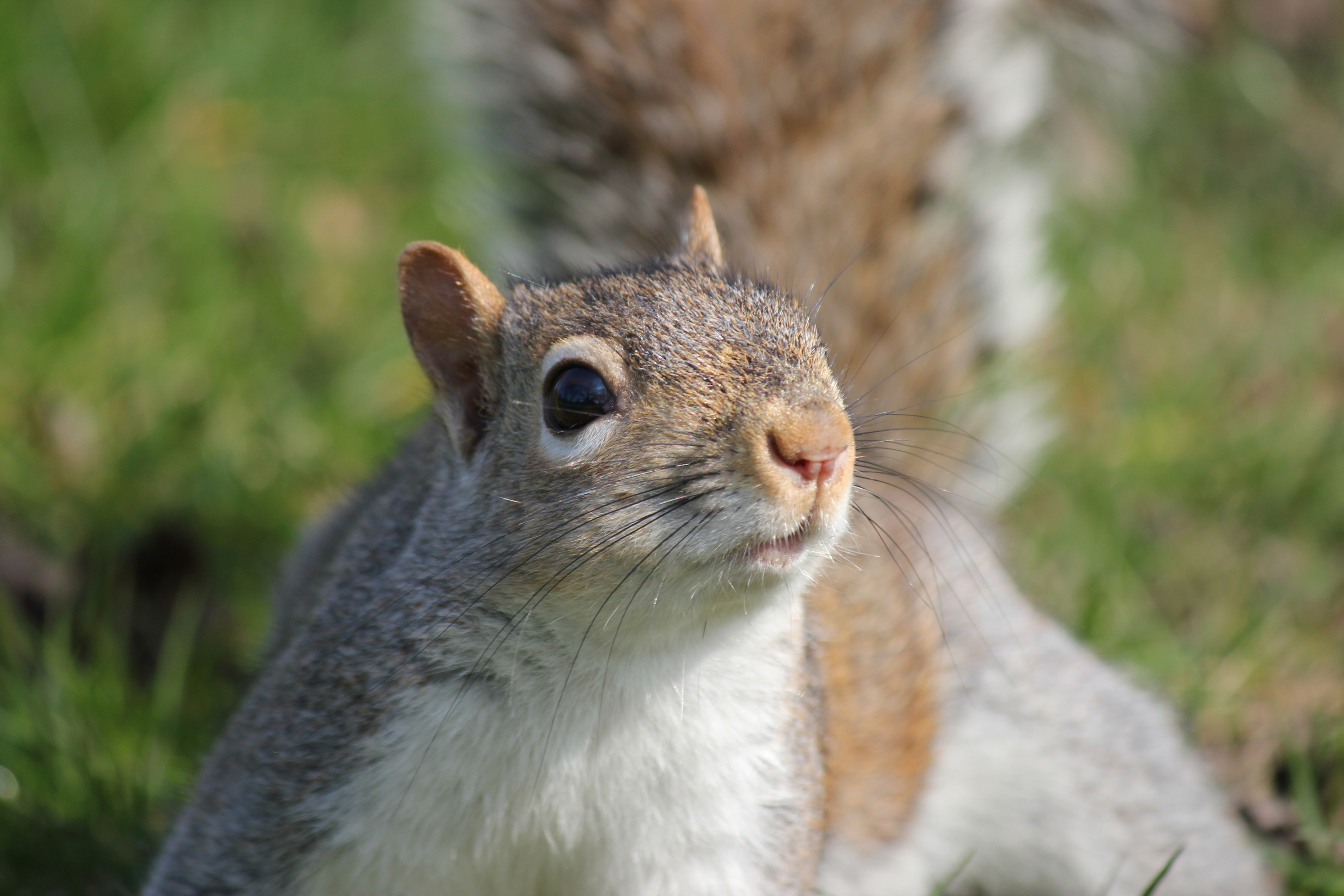 Ein Grauhörnchen im Londoner Hyde Park.